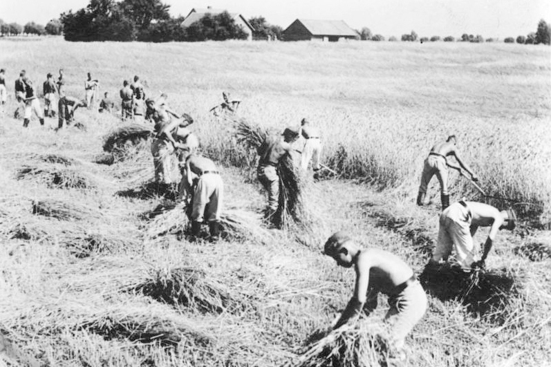 51300 Reichsarbeitsdienst als Erntehelfer. In Ostpreußen wurden gestern vier motorisierte Erntehilfszüge des Reichsarbeitsdienstes eingesetzt, die überall eingreifen, wo eine schnelle Einbringung der Ernte notwendig erscheint. Jedem Zug gehören 36 Arbeitsmänner an, die sämtlich mit Sense arbeiten können. Scherl Bilderdienst, Berlin/ 28.7.1938 [Herausgabedatum] AV 51 300